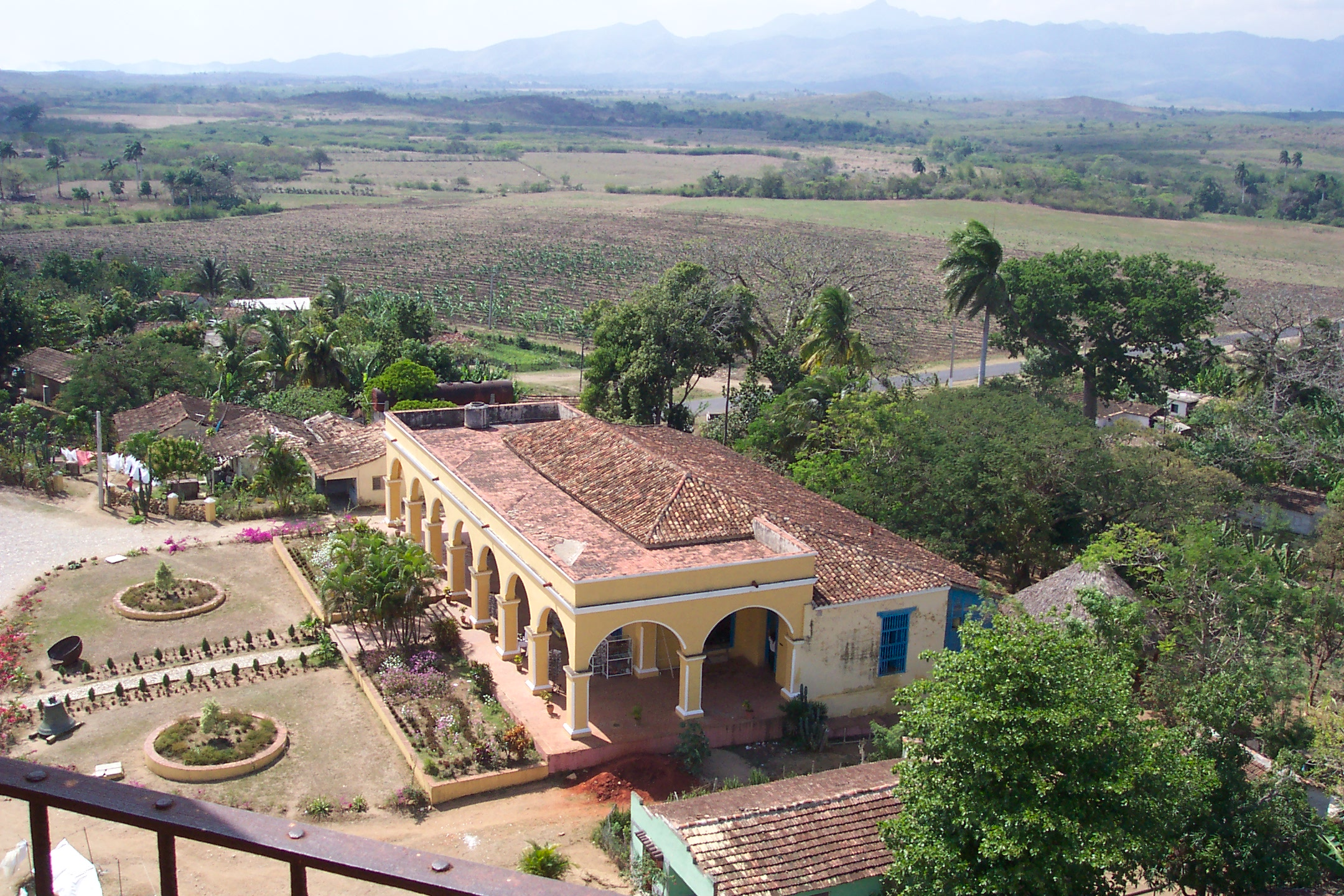 House at Manaca Iznaga, Valle de los Ingenios, Cuba